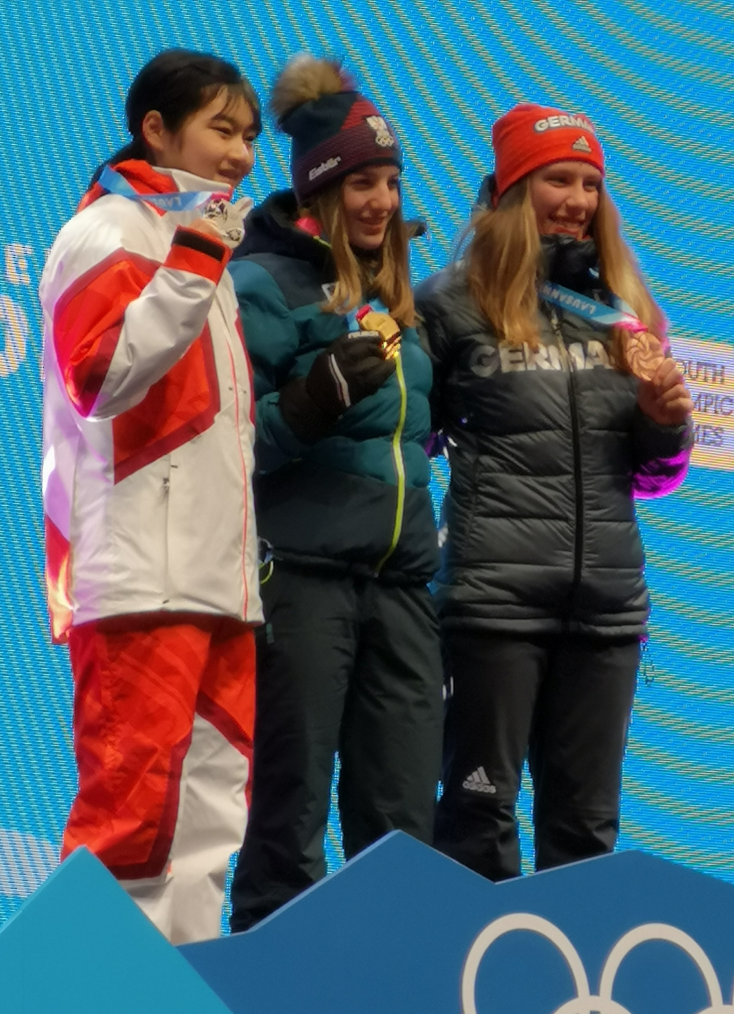 Le podium du combiné nordique féminin individuel aux JOJ de Lausanne 2020 : Lisa Hirner (AUT), Ayane Miyazaki (JPN) et Jenny Nowak (GER).